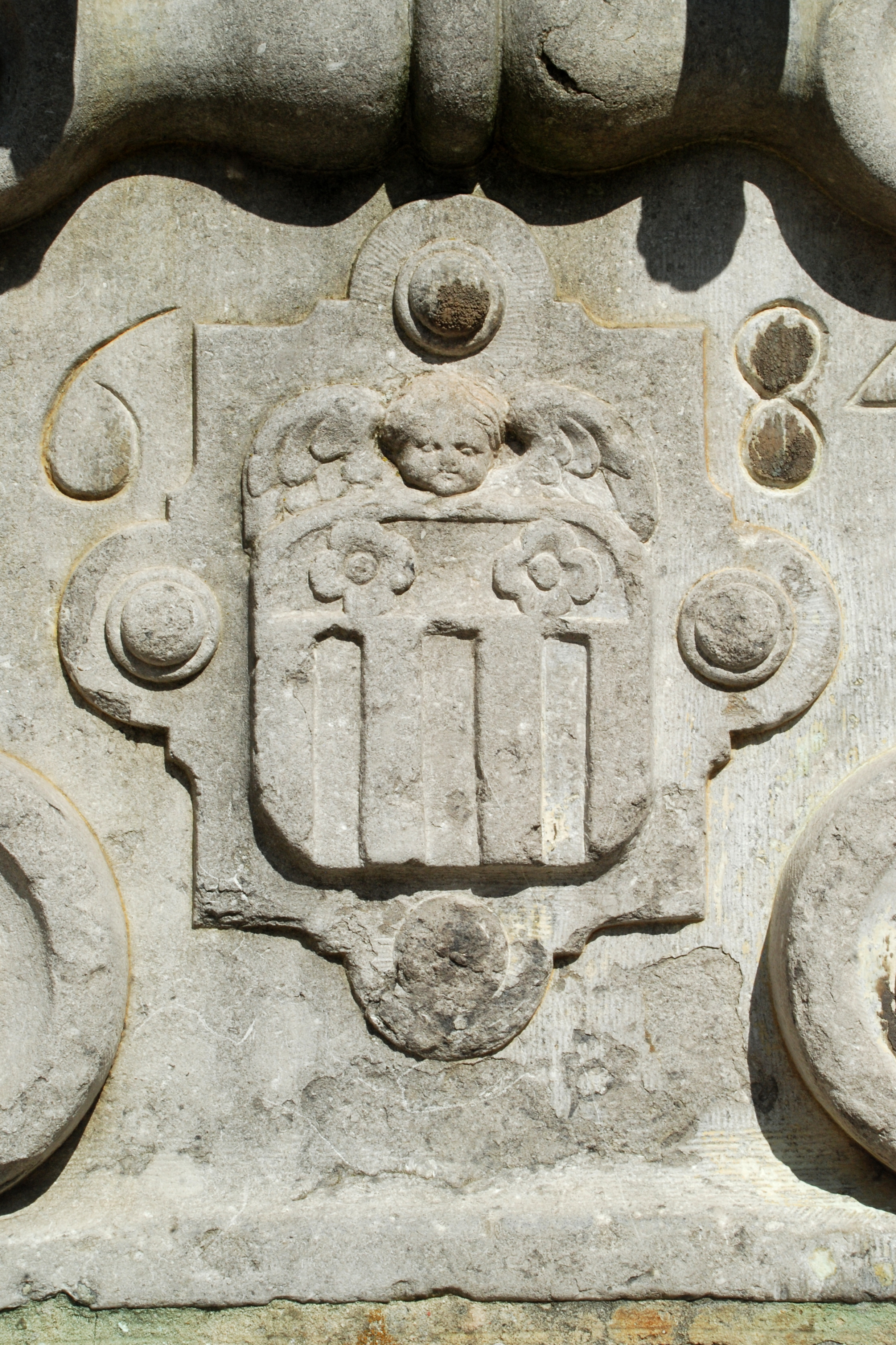 Belgium - Leuven - Groot Begijnhof - Convent van Lommel - Benedenstraat 41